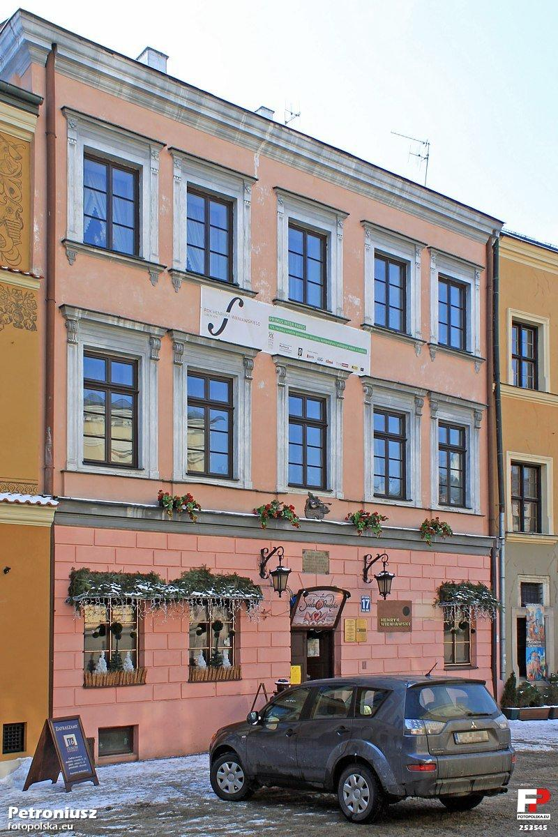 Kamienica Wieniawskich na lubelskim Rynku.